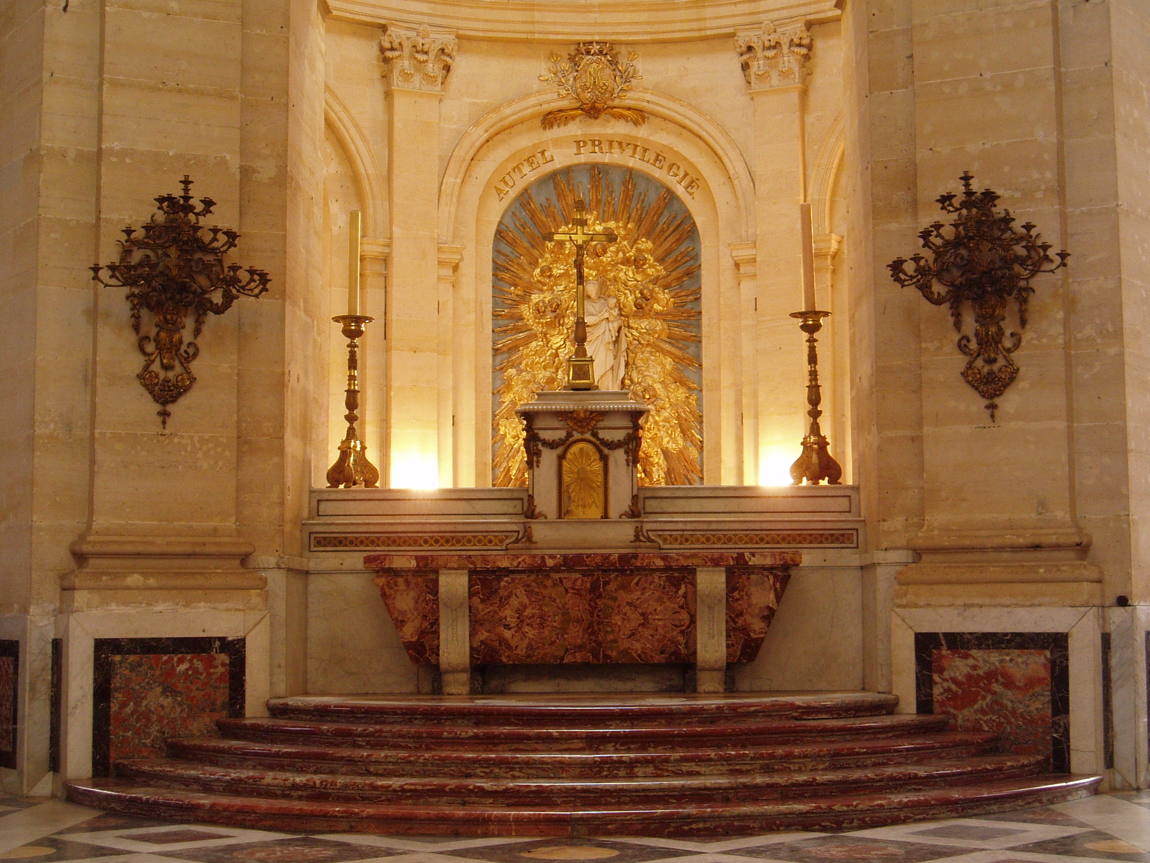 Cathédrale Saint-Louis de Versailles Architecte : Jules Hardouin Mansart de Sagonne Construction : 12 juin 1743 Inauguration : 24 août 1754 consacrée cathédrale en 1843